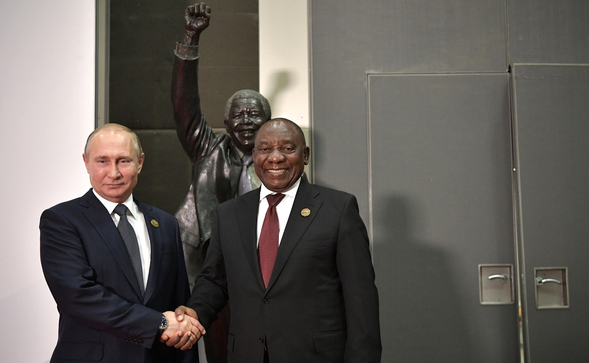 С Президентом ЮАР Сирилом Рамафозой перед началом саммита БРИКС.